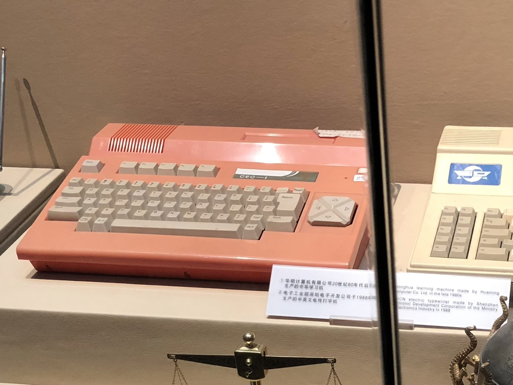 中文（中国大陆）: 深圳80年代产品